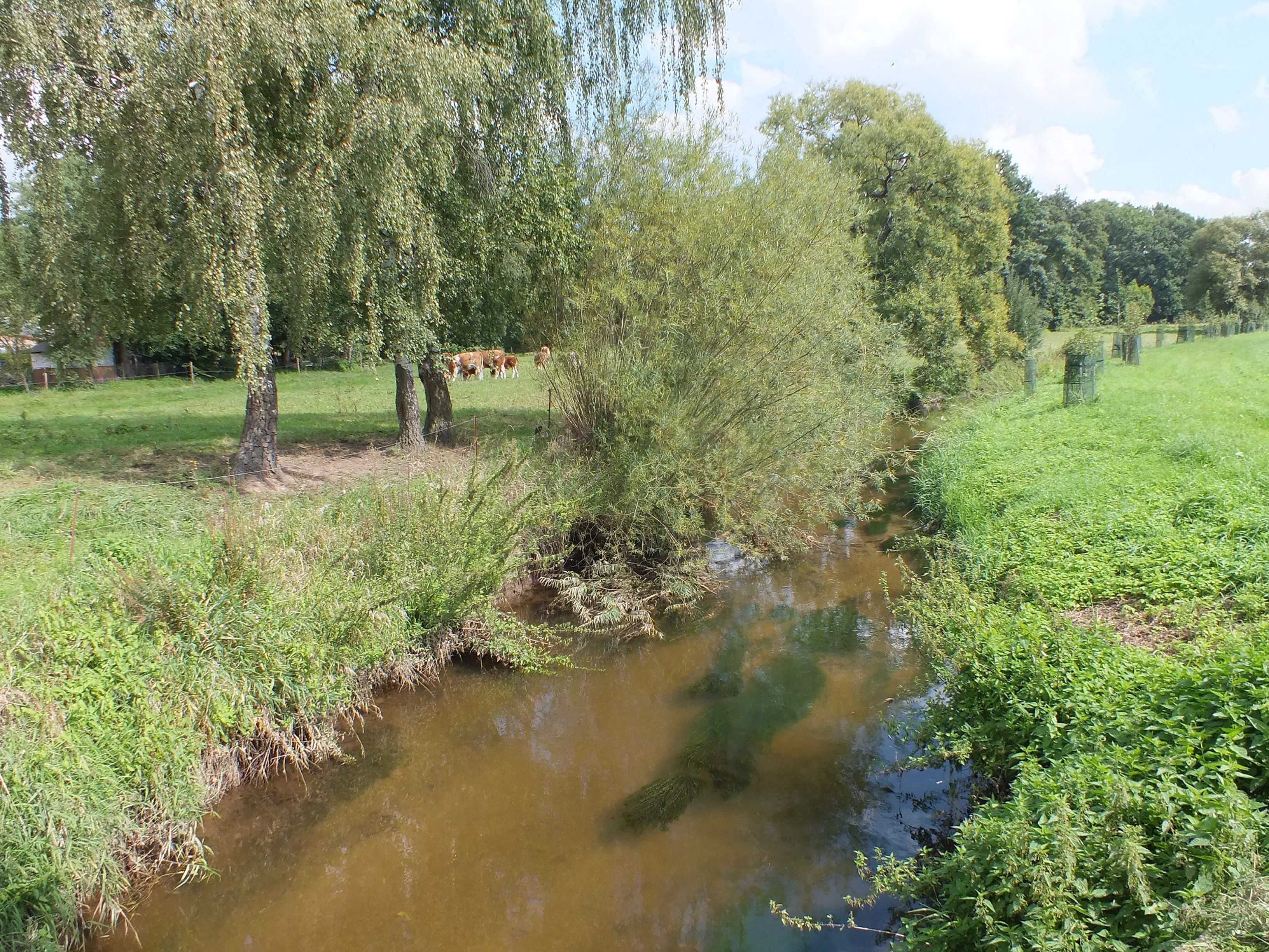 Die Eula bei Beucha (Bad Lausick)